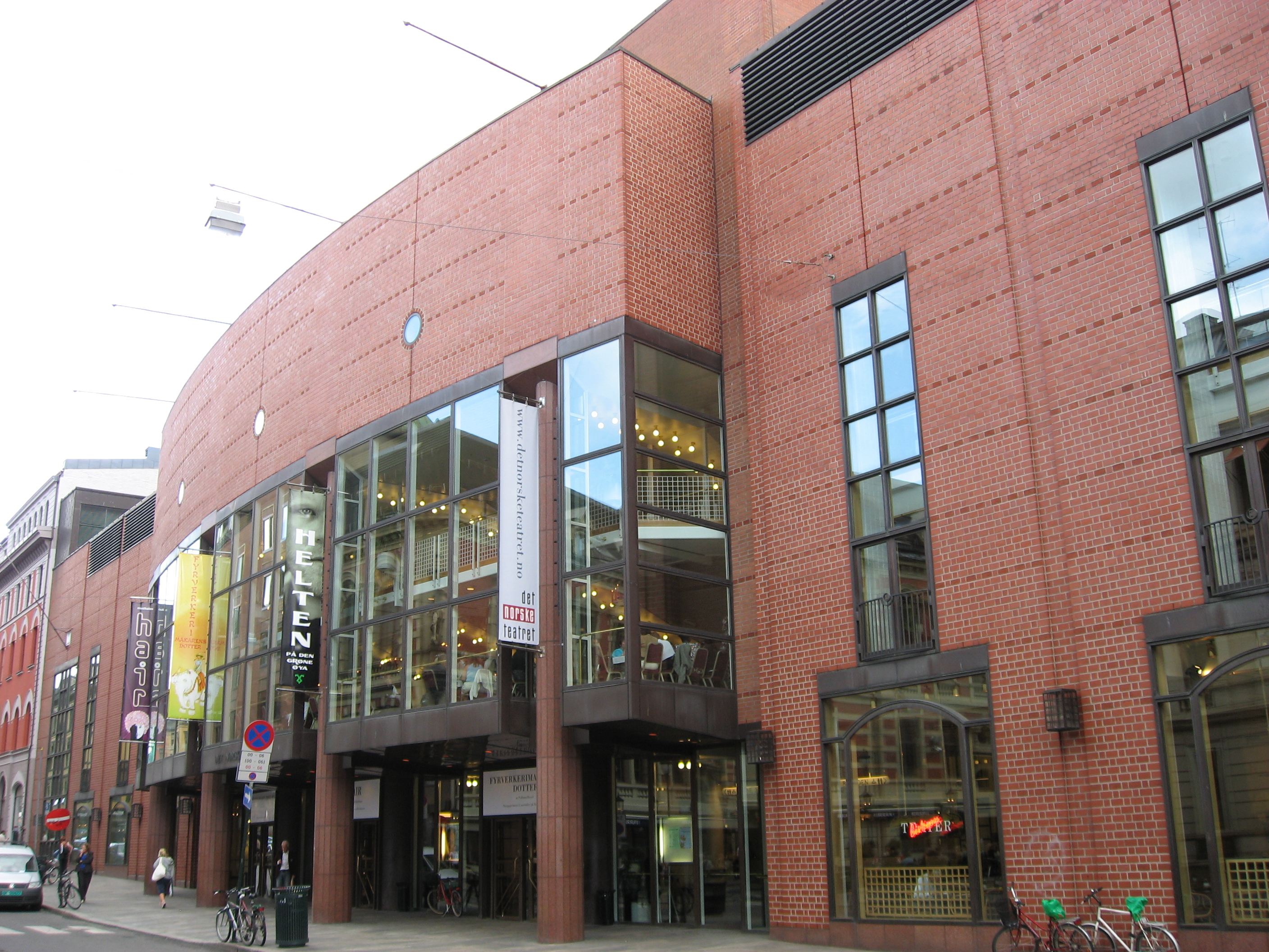 Det norske teatret - A theater i Oslo, Norway. Built 1985; architects: 4 B Arkitekter.